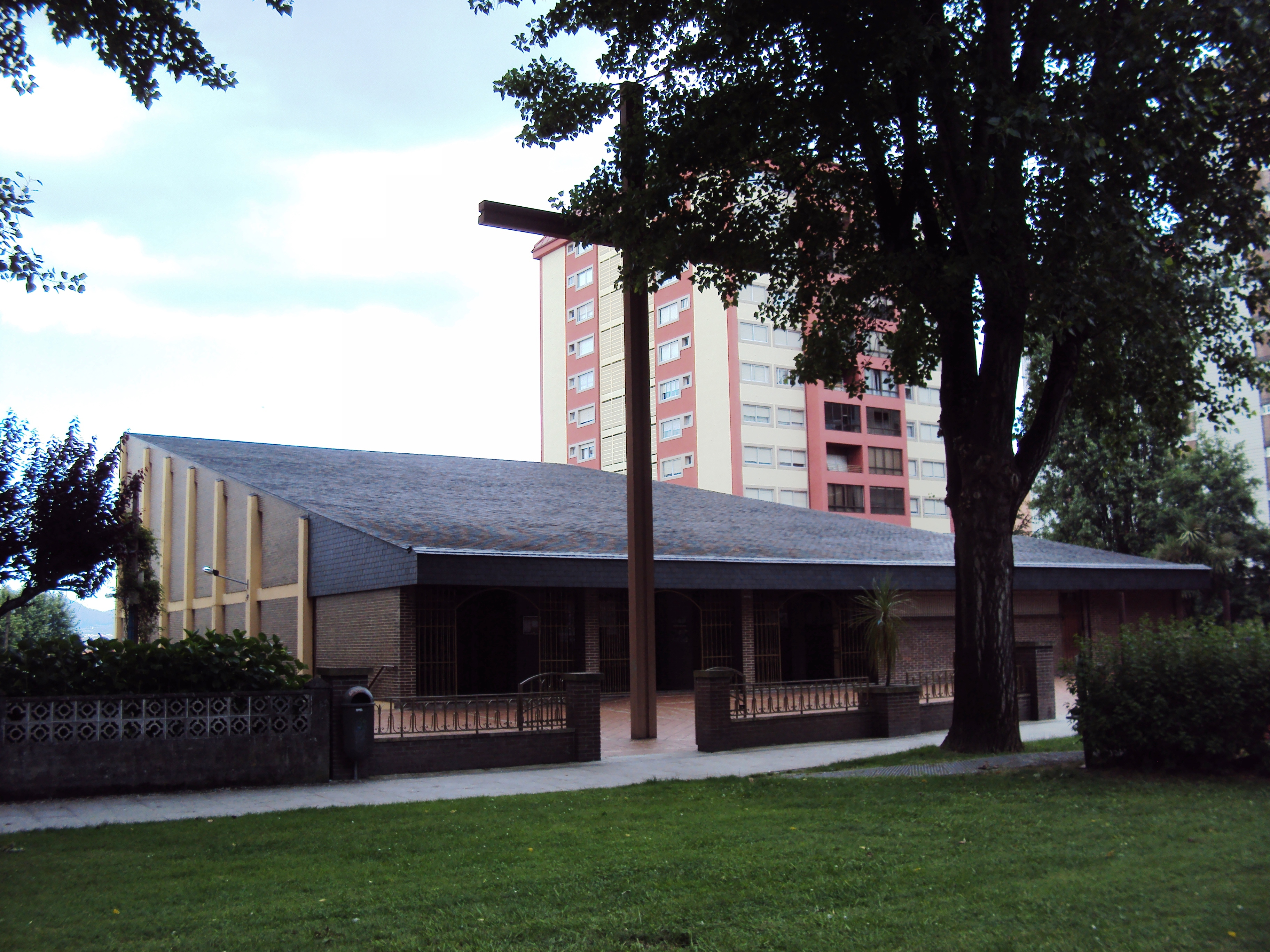 iglesia parroquial de Nuestra Señora del Rocío, Coia, Vigo